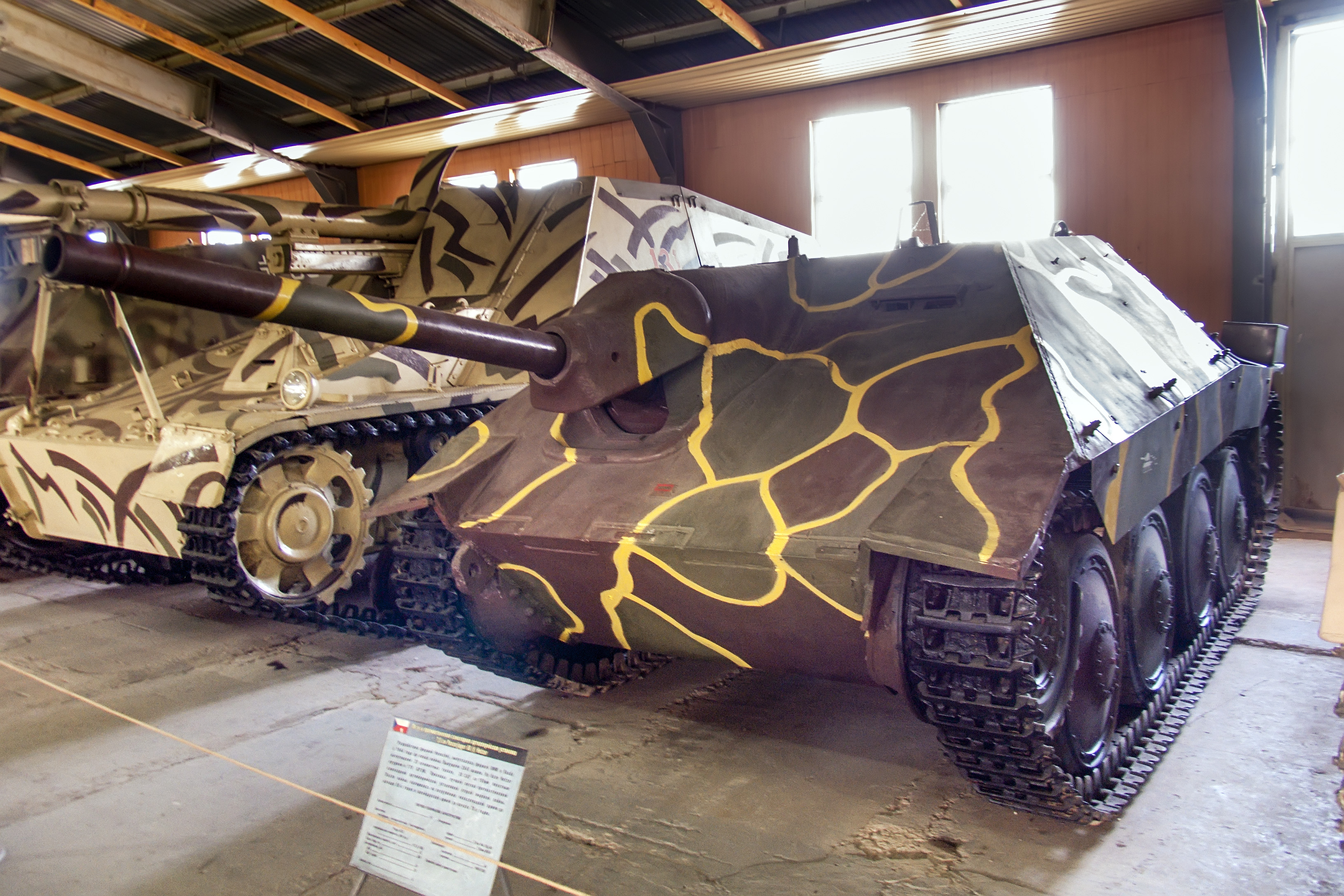 Противотанковая самоходная установка «Хетцер» (Jagdpanzer 38(t), Sd.Kfz 138/2) в Центральном музее бронетанкового вооружения и техники в Кубинке.